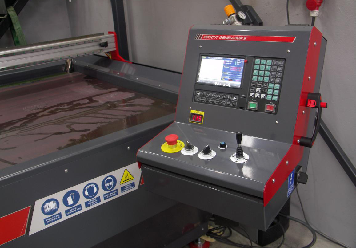 Stół CNC wodny. Zdjęcie pulpitu sterowniczego i fragmentu stołu.